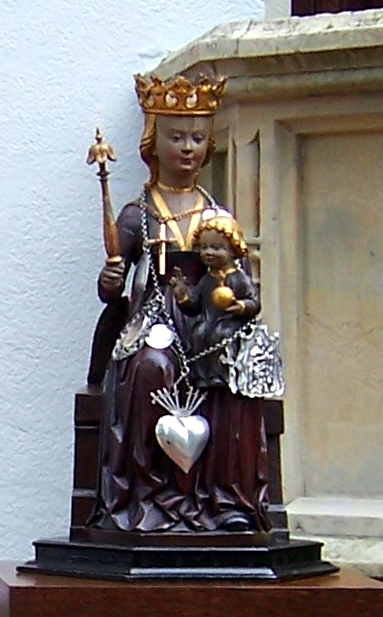 Stadtlohn, Hilgenbergkapelle, Raesfelder Madonna (15. Jahrhundert) mit Votivgaben